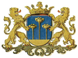 Gegevens van Gemeente Zoetermeer